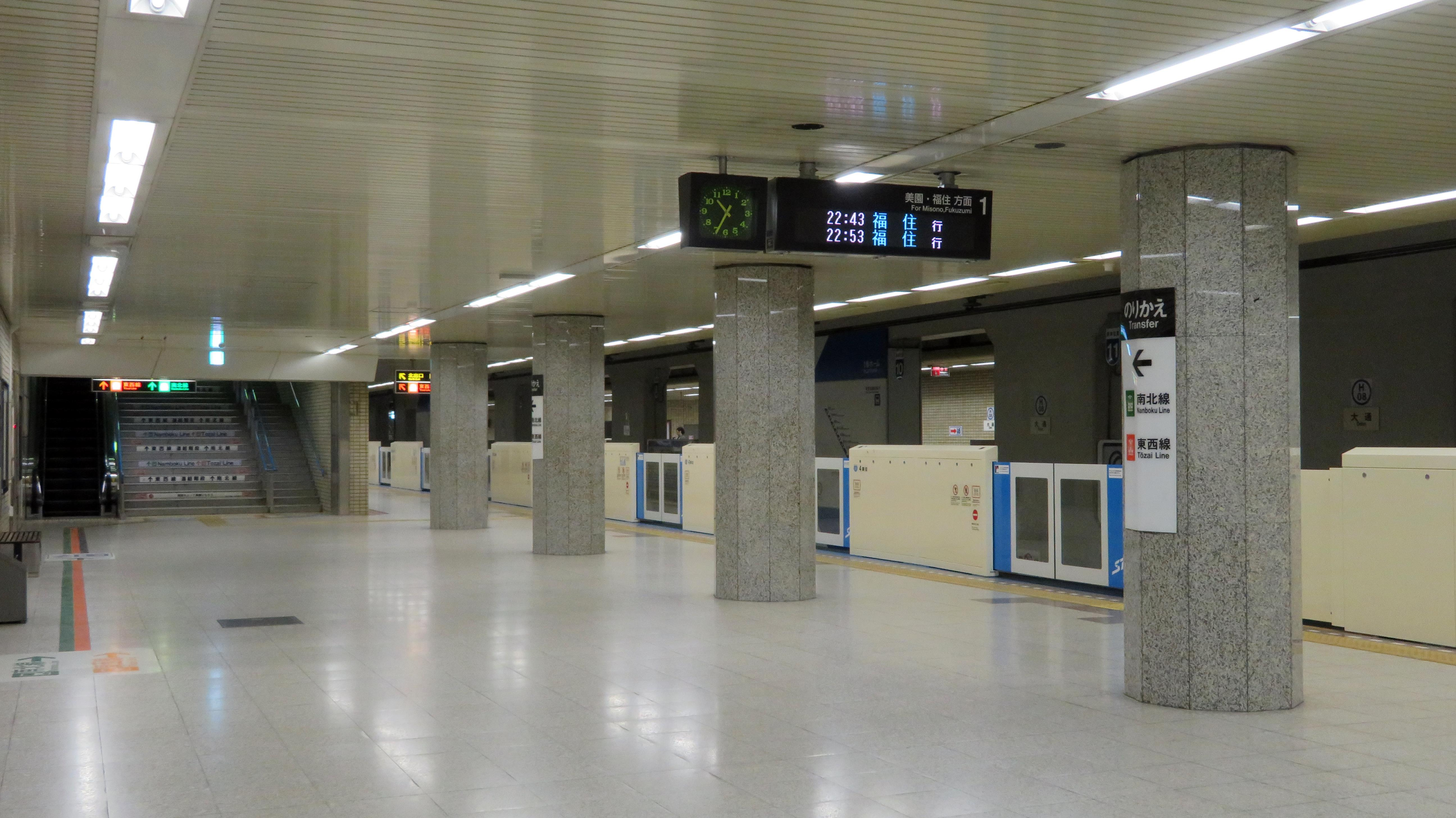 東豊線大通駅ホーム